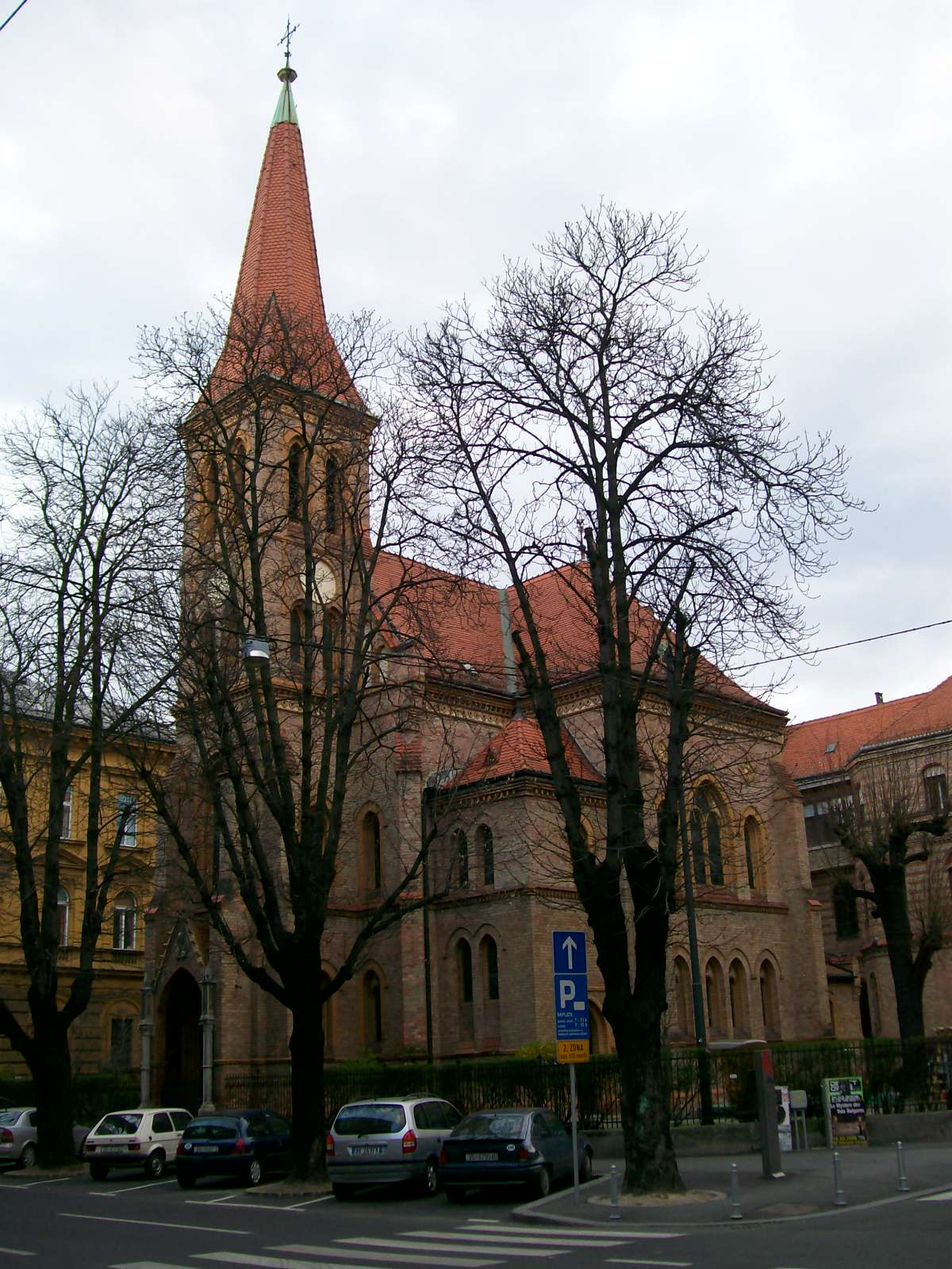 Evangelicka crkva u Zagrebu.